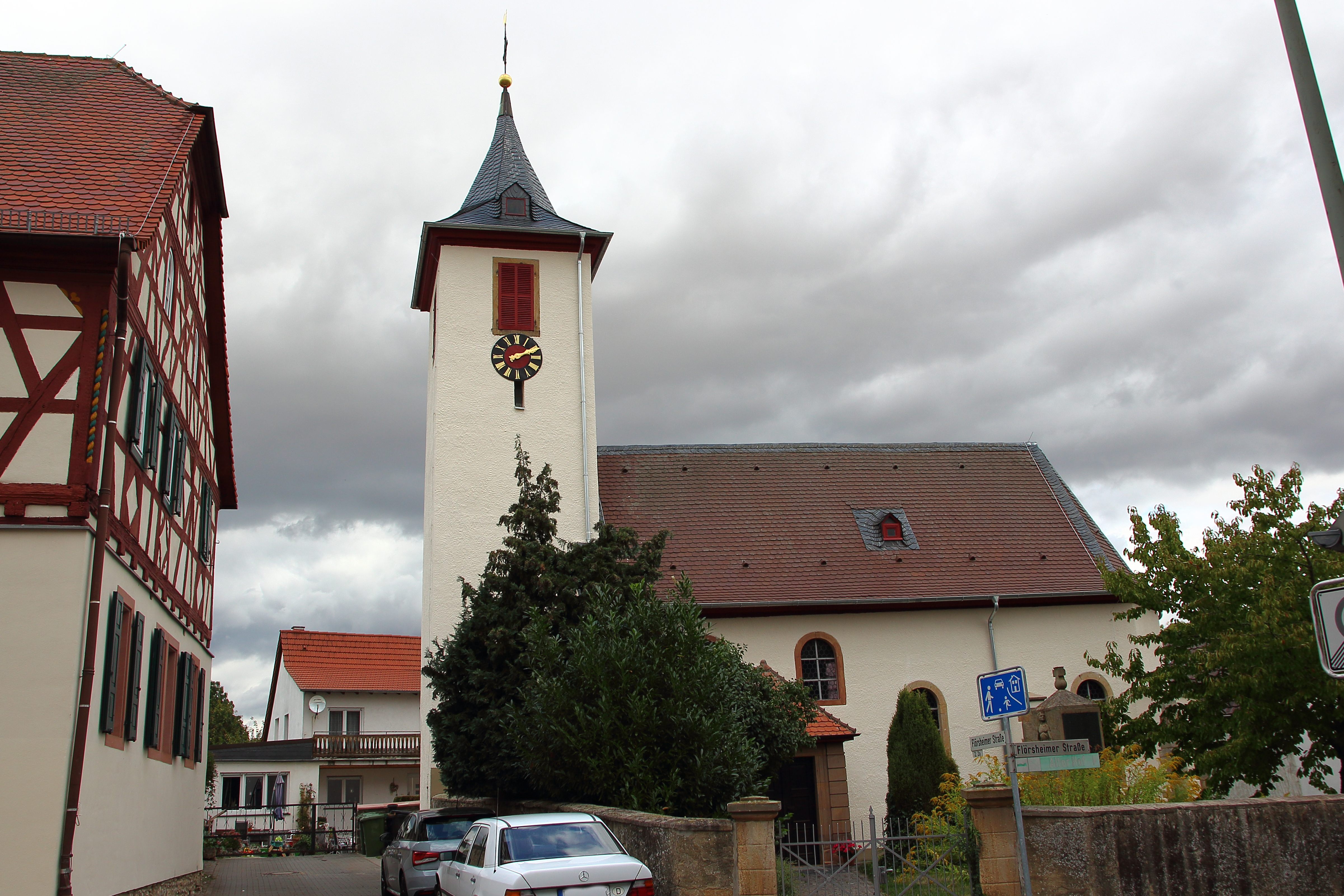 Protestantische Kirche der Gemeinde Bischheim, Flörsheimer Strasse 2